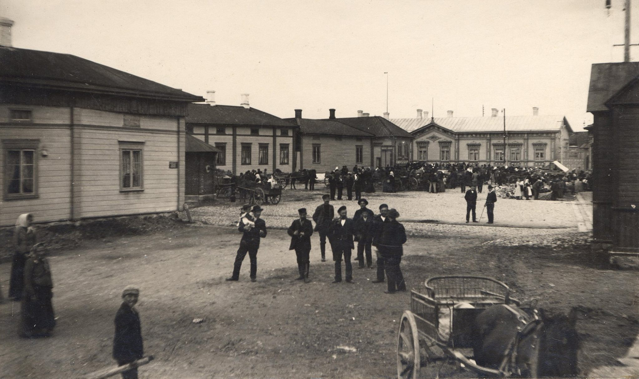 Rauman kalatori 1900-luvun alussa.